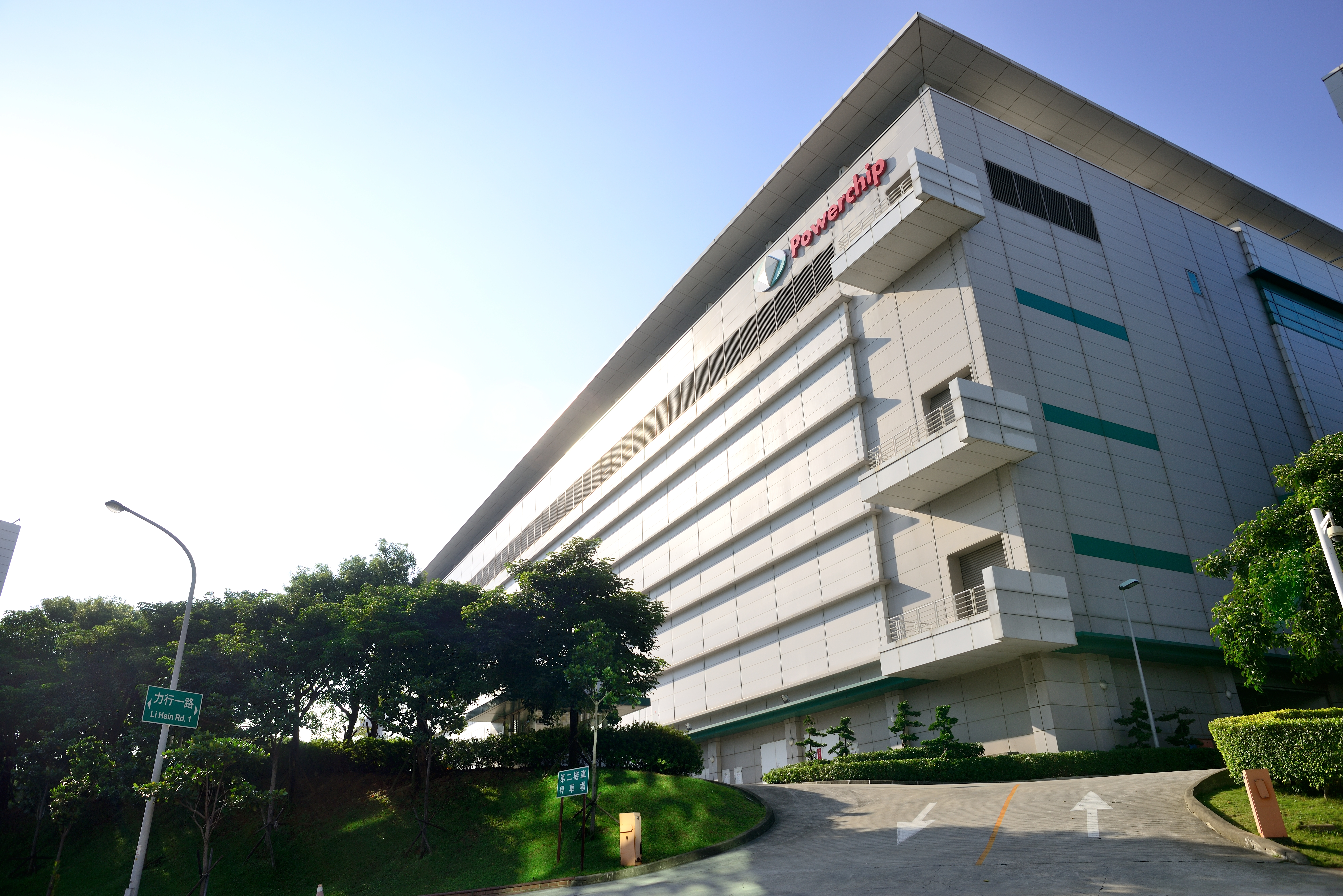 中文（台灣）: 力晶科技總部、P1廠、P2廠，地址：新竹市新竹科學工業園區力行一路12號。